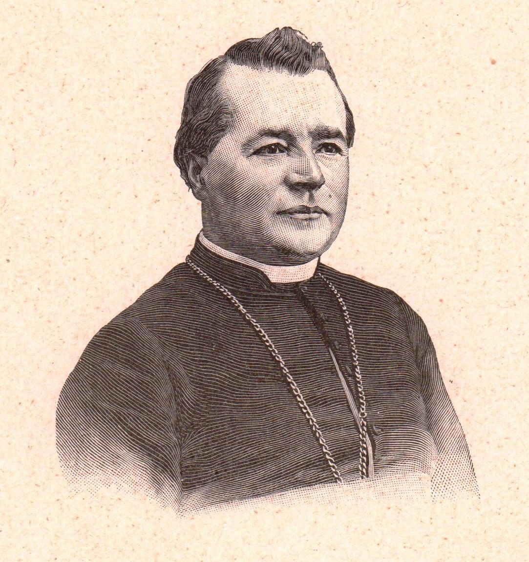 Mgr Touchet, évêque